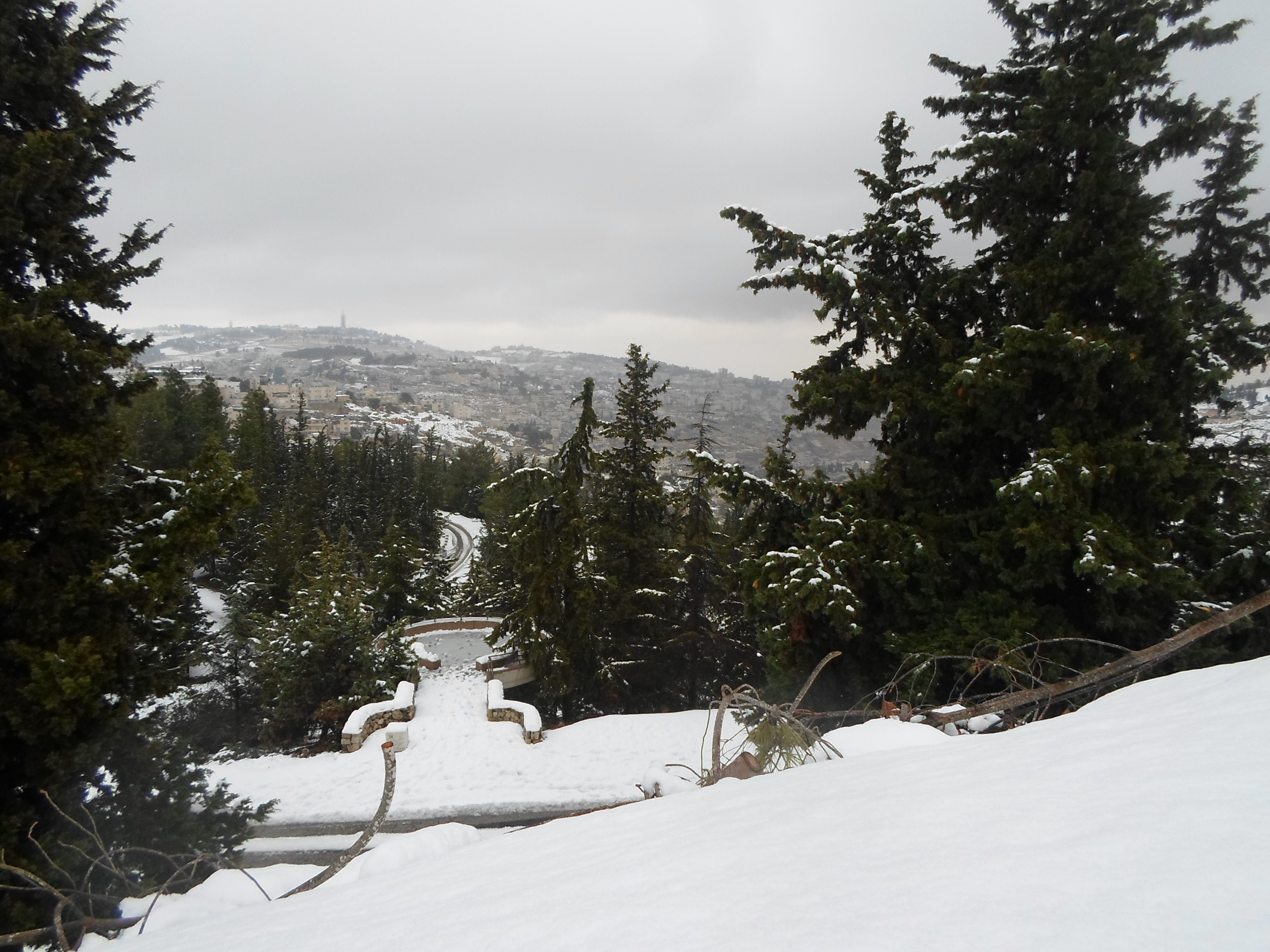 טיילת שרובר במהלך סערת שלג.